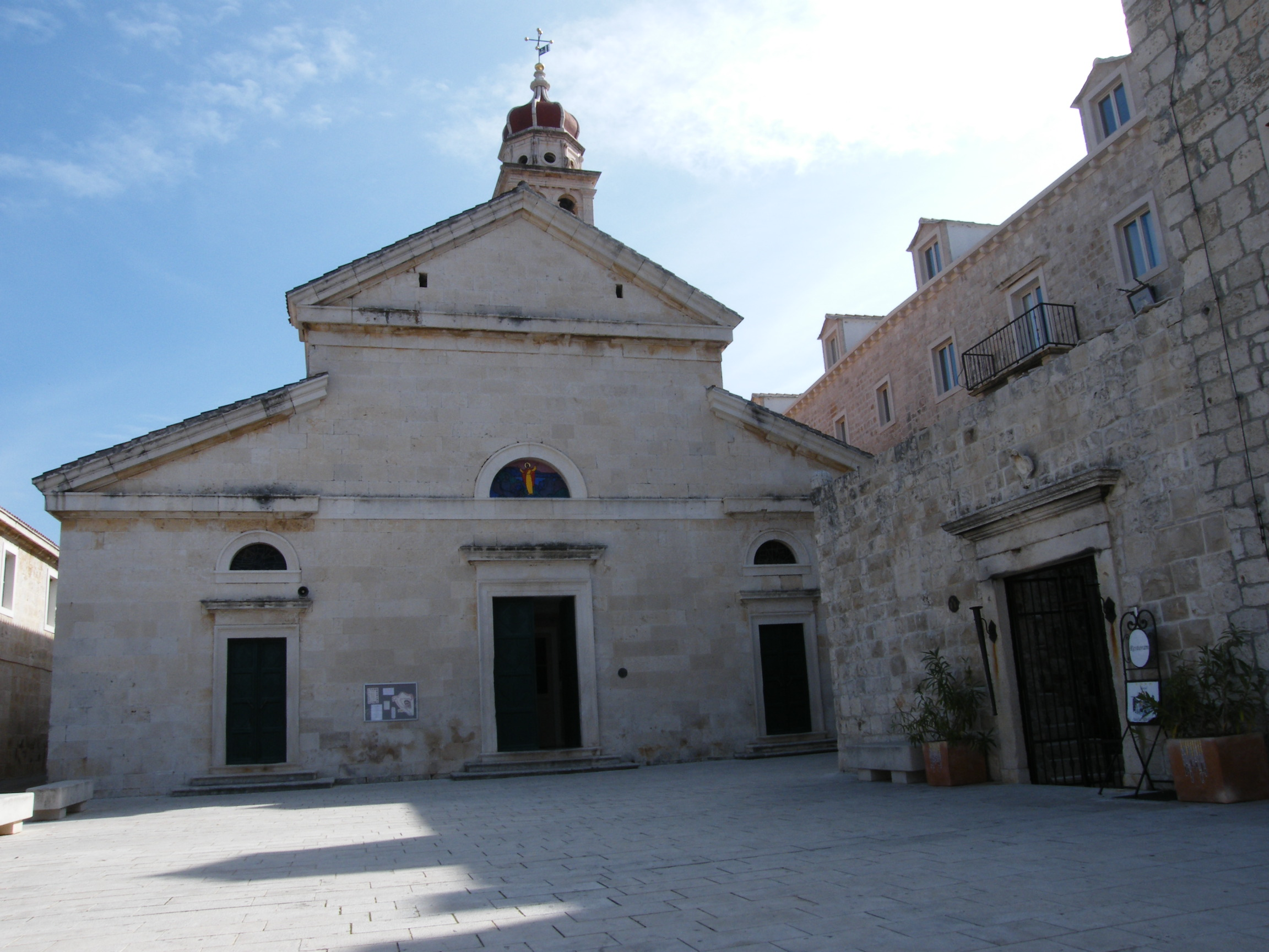 Pučiśća, Kościół Św. Stjepana. Szent Jeromos plébániatemplom (wikipedia)